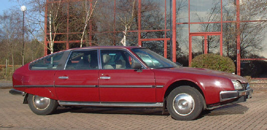 (del) (cur) 21:55, 24 August 2004 . . (46025 bytes) (CX Pallas Saloon - Series 1)